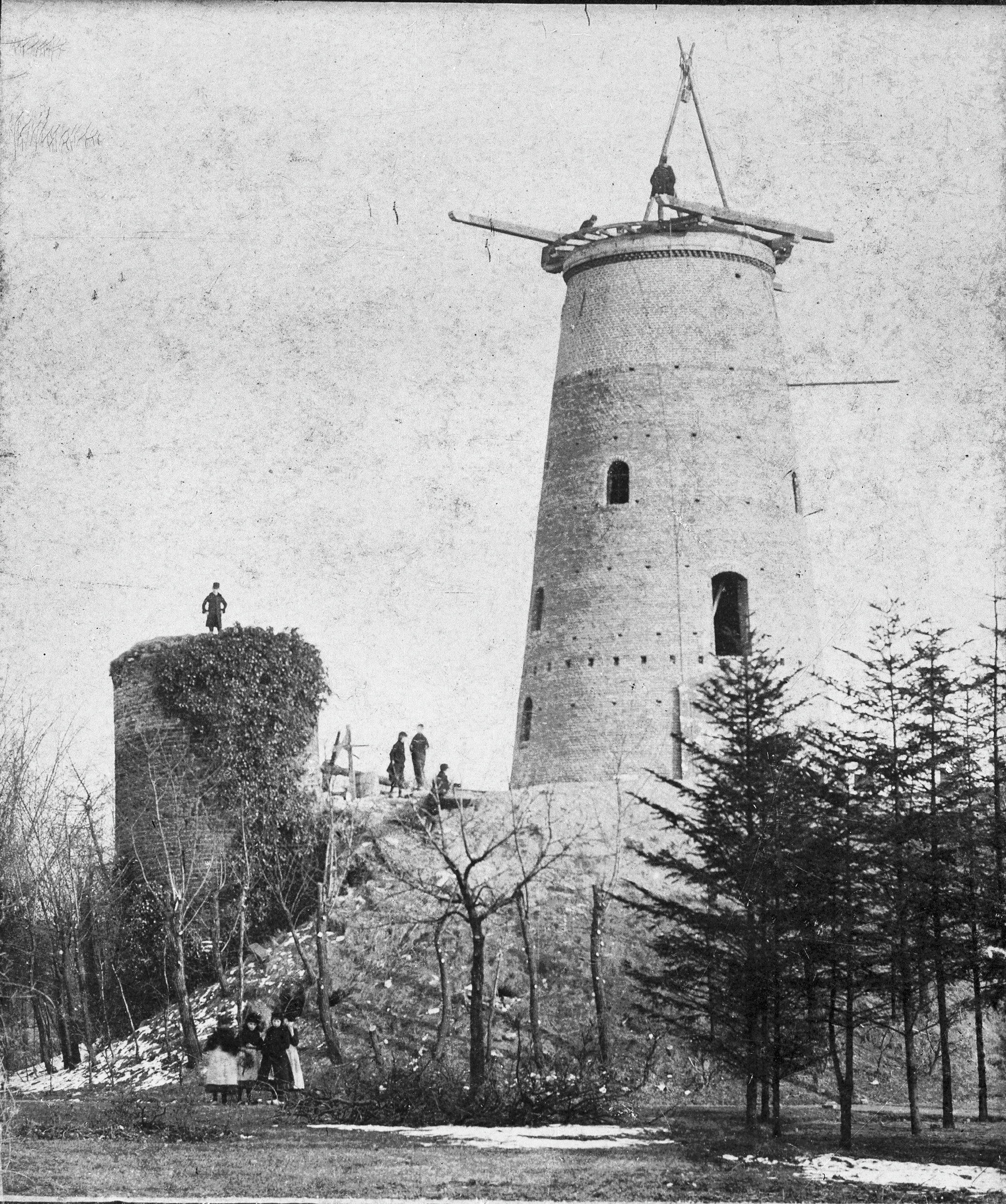 bouw van korenmolen